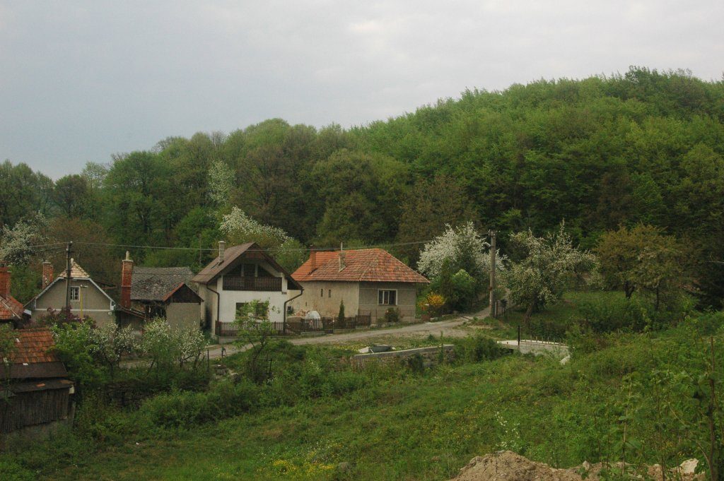 Cigeľ